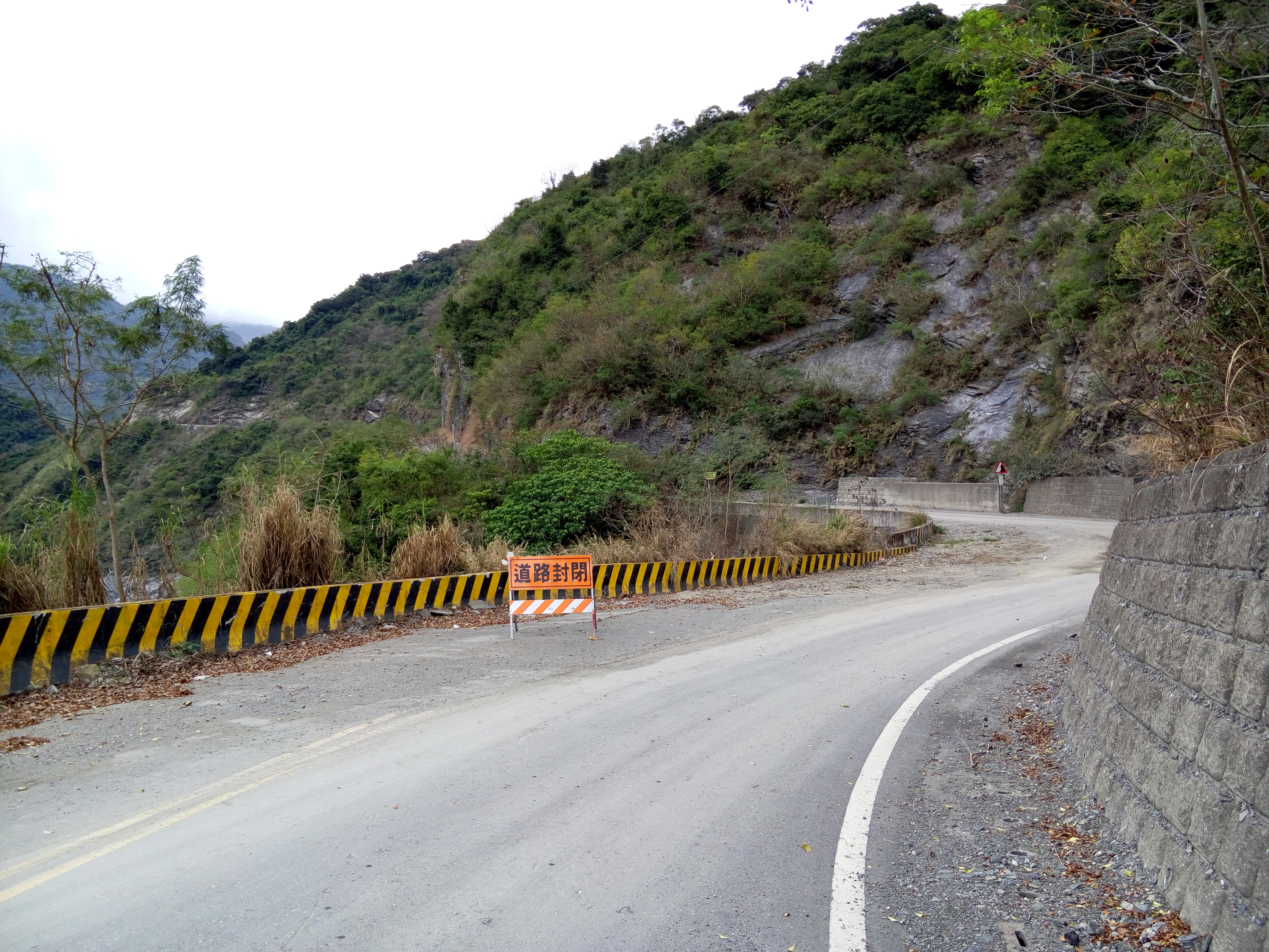 內本鹿古道東段 東36鄉道現況